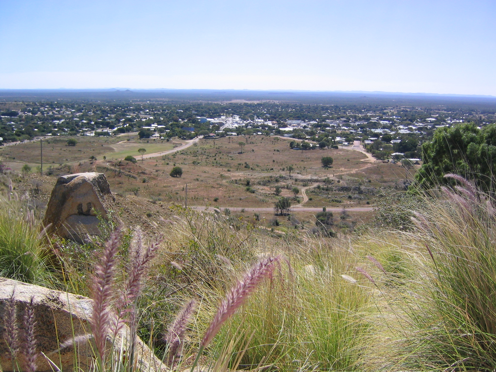 Over looking Charters Towers.